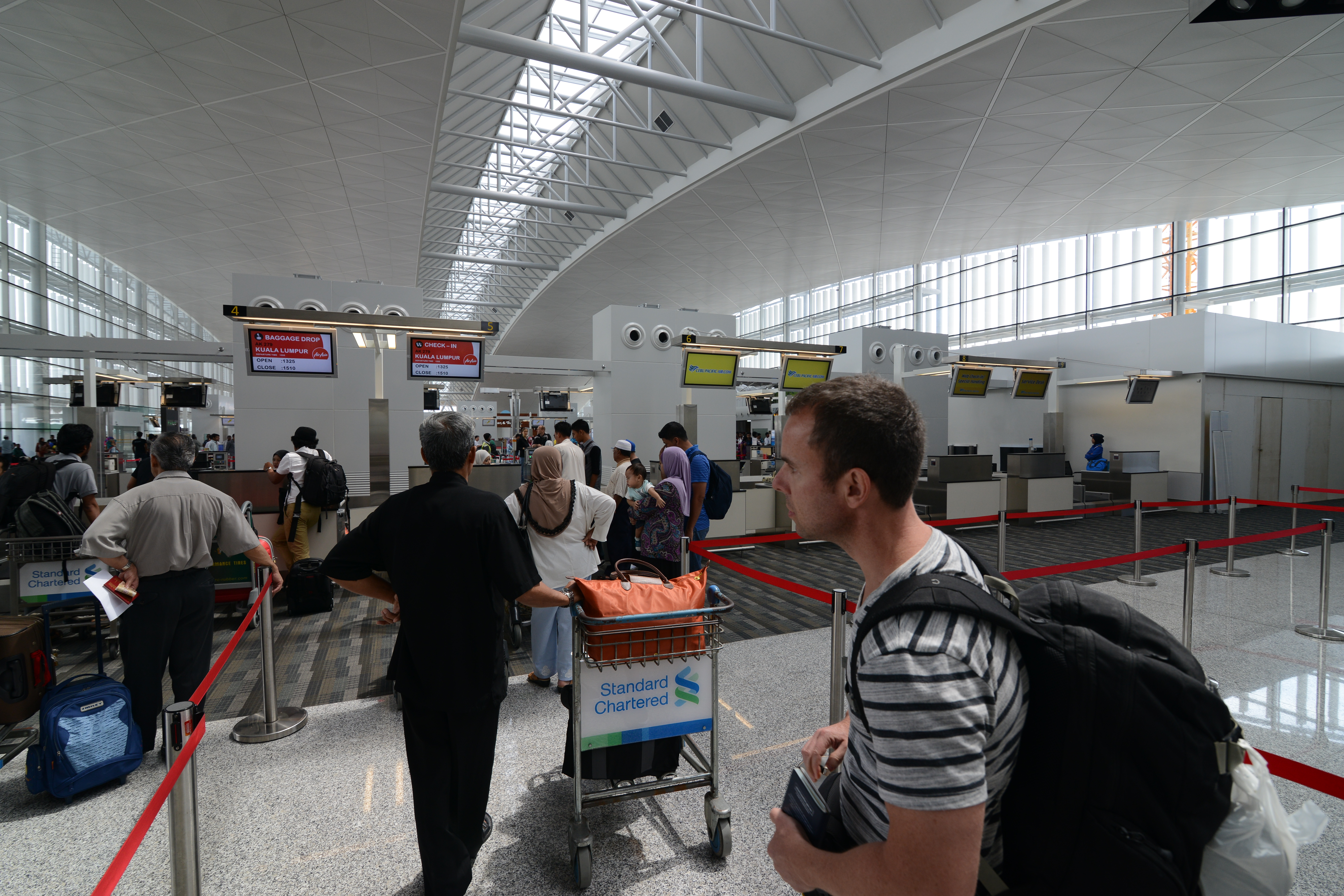 Departure Hall Brunei Airport